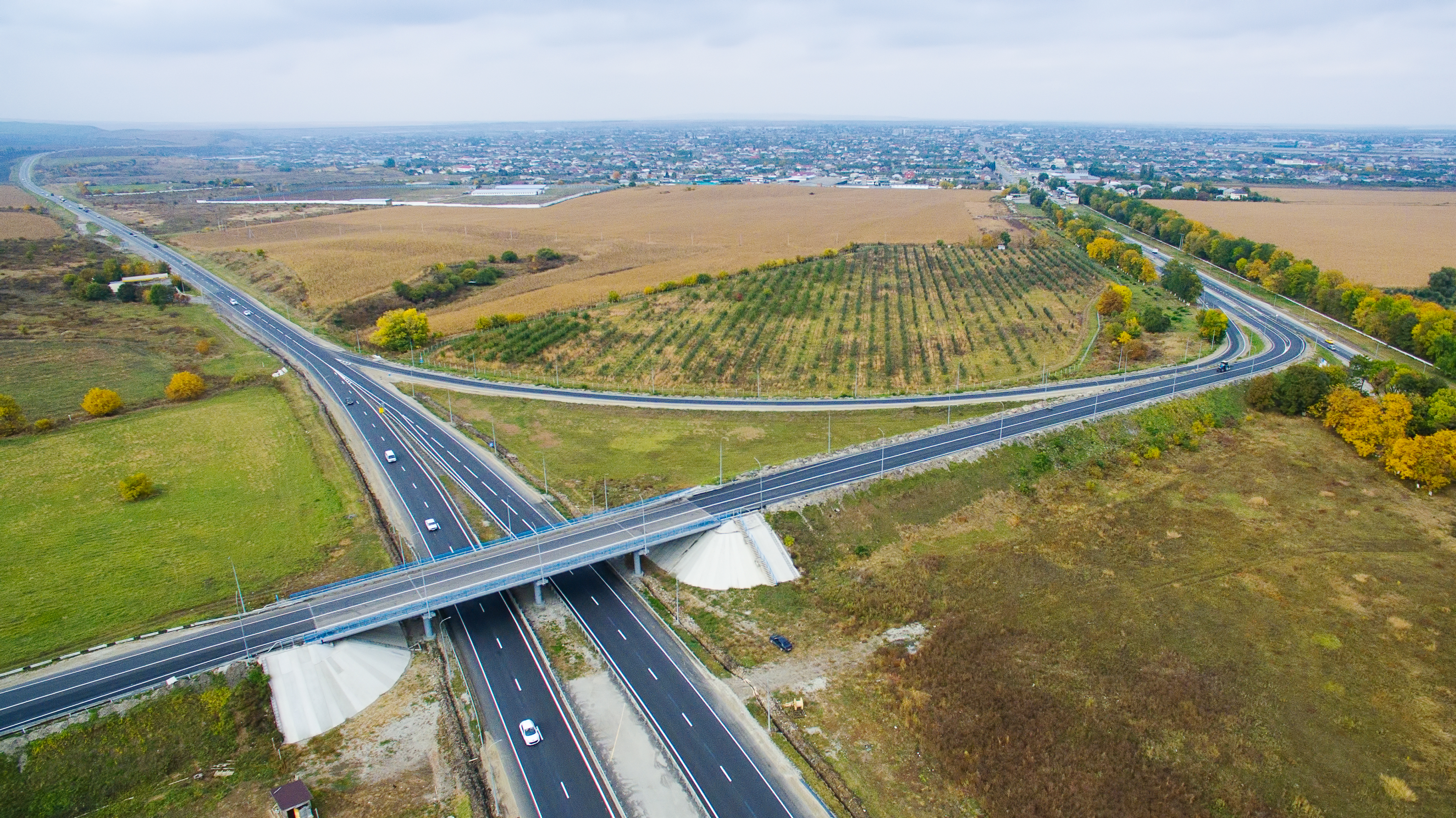 Федеральная автомобильная дорога Р-217 «Кавказ», 19 км (Республика Кабардино-Балкария)